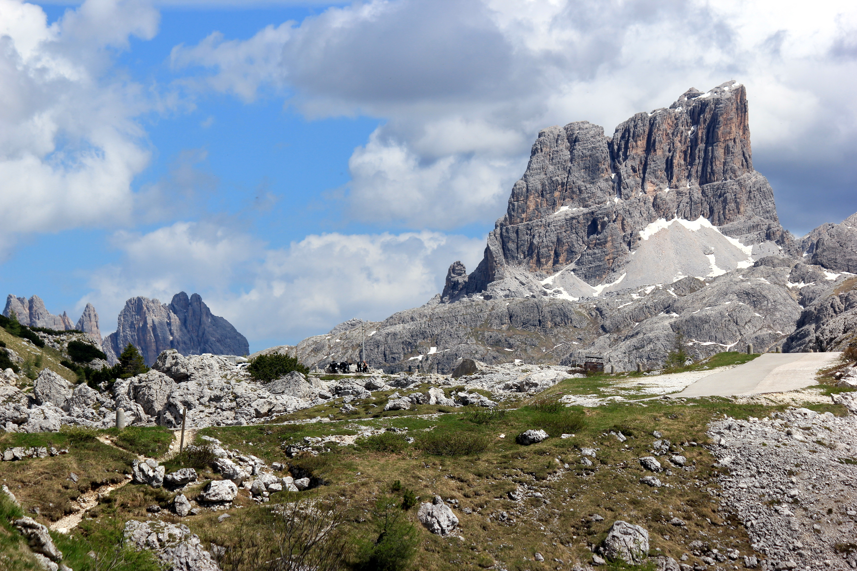 Auf dem Valparolapass, Blick nach Osten zum Averau.